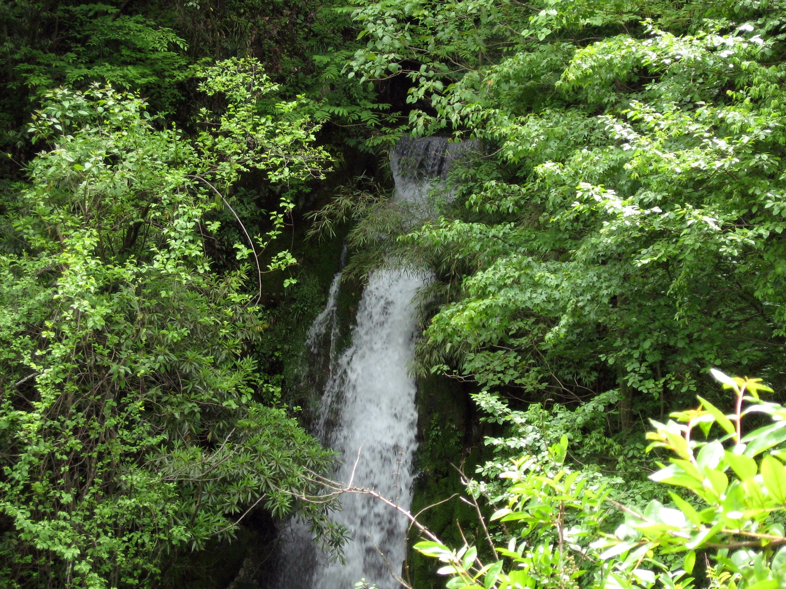 山涧瀑布